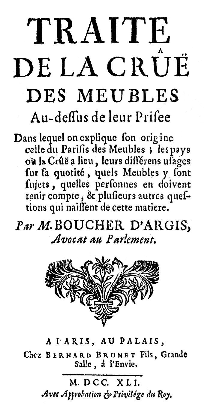 Frontispice du Traité de la Crue d'Antoine-Gaspard Boucher d'Argis (1741)